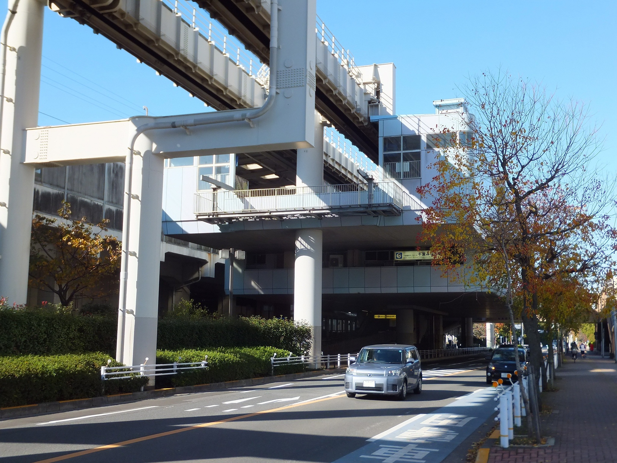 千葉都市モノレール千葉みなと駅